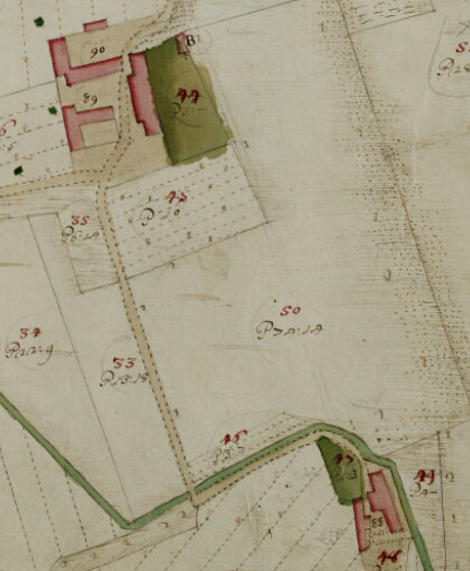 Mappa catastale delle Cascine Guascona e Guasconcina